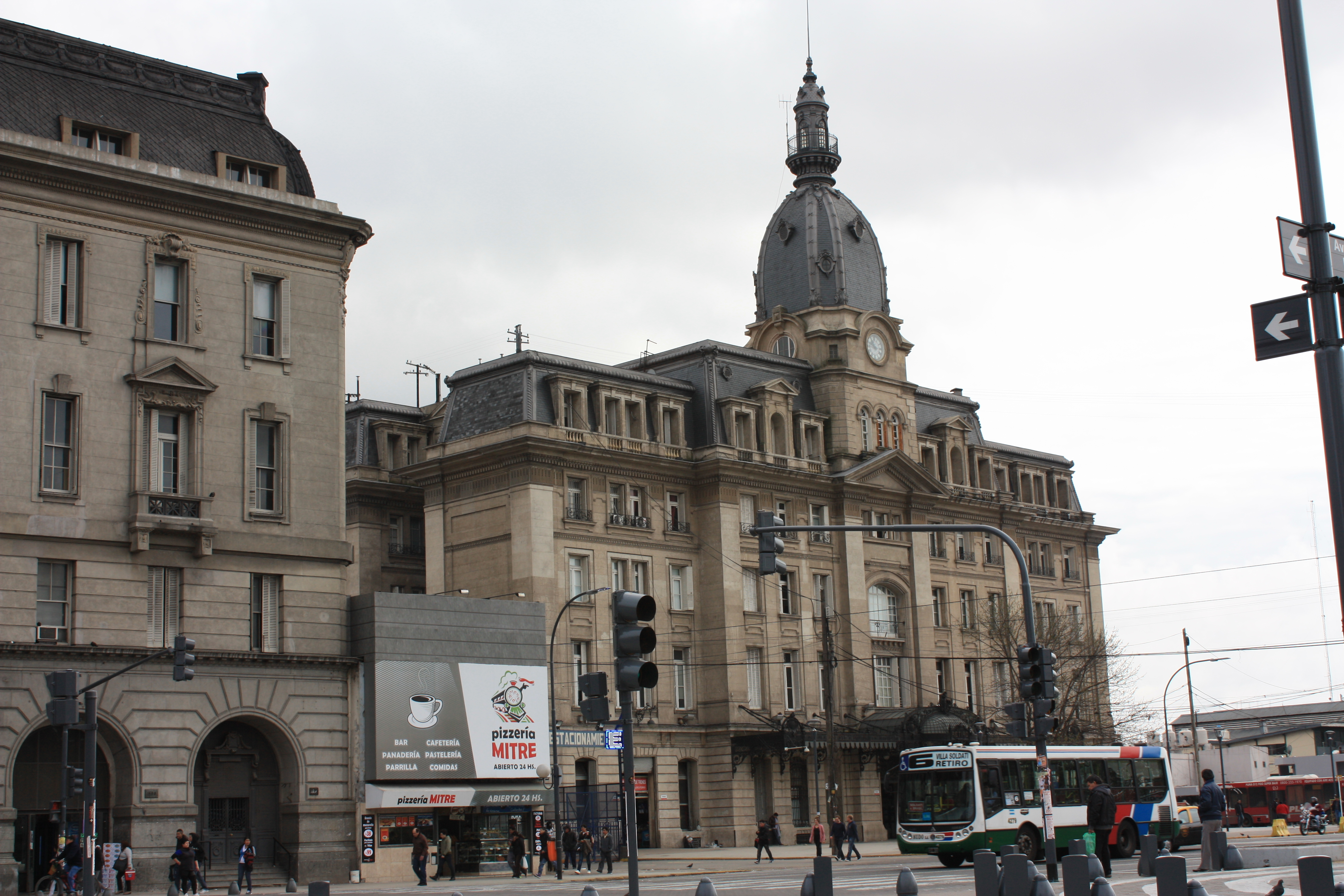 Area Retiro